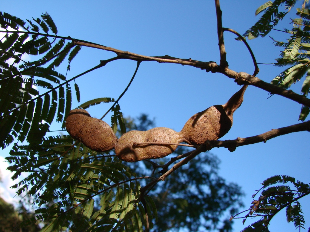 fruits of Anadenanthera colubrina - FABACEAE Parque Olhos D'Água - Brasília - Distrito Federal - Brasil.